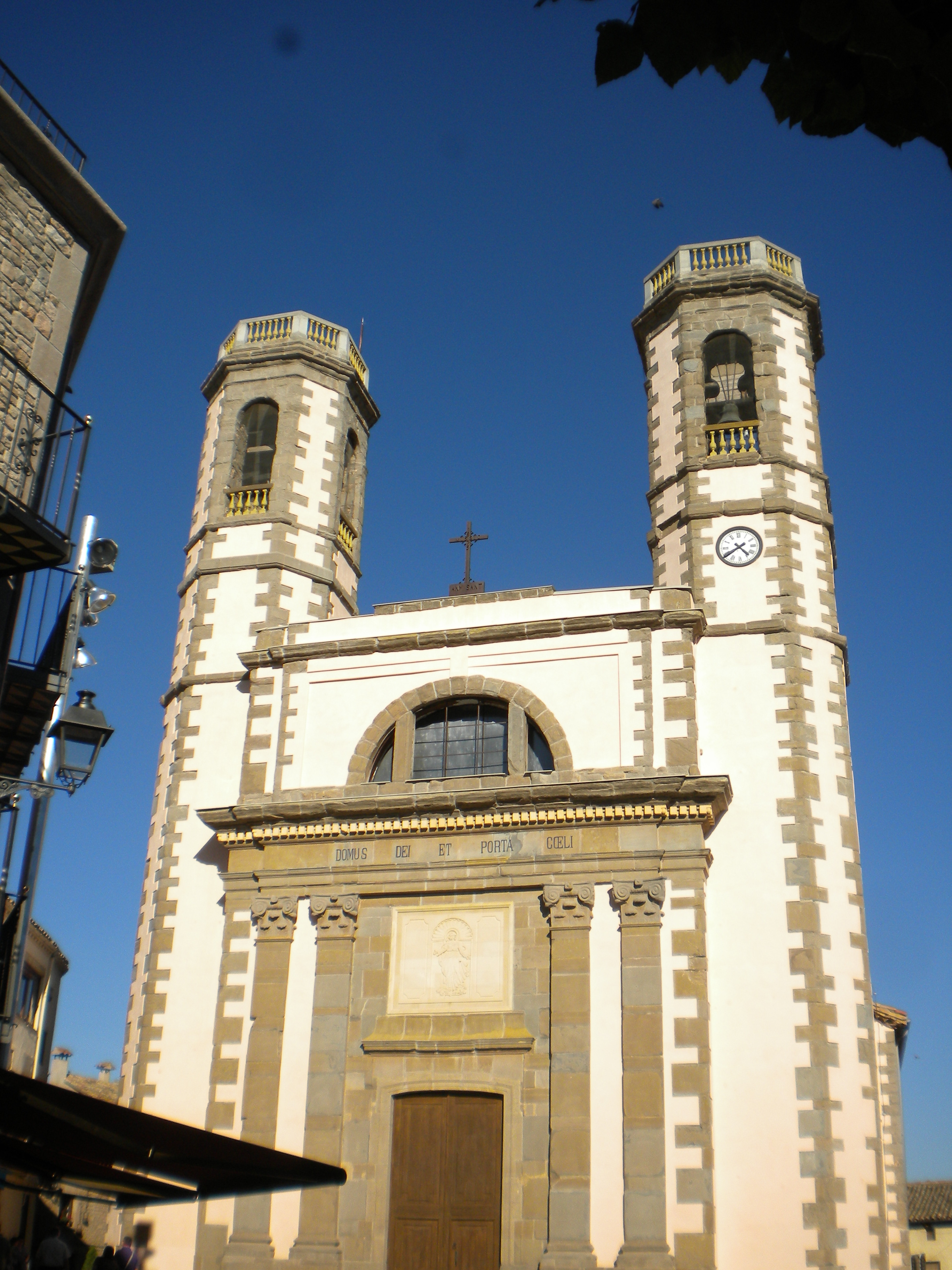 Façana de l'església parroquial de Santa Maria d'Olost amb els seus campanars octogonals característics. Comarca d'Osona, Catalunya.